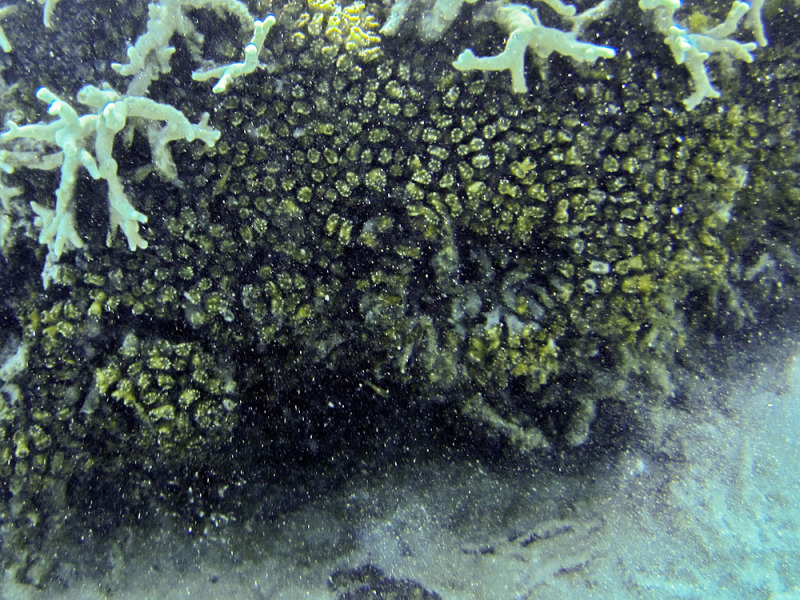 Caulastraea furcata, Lizard Island, Australia